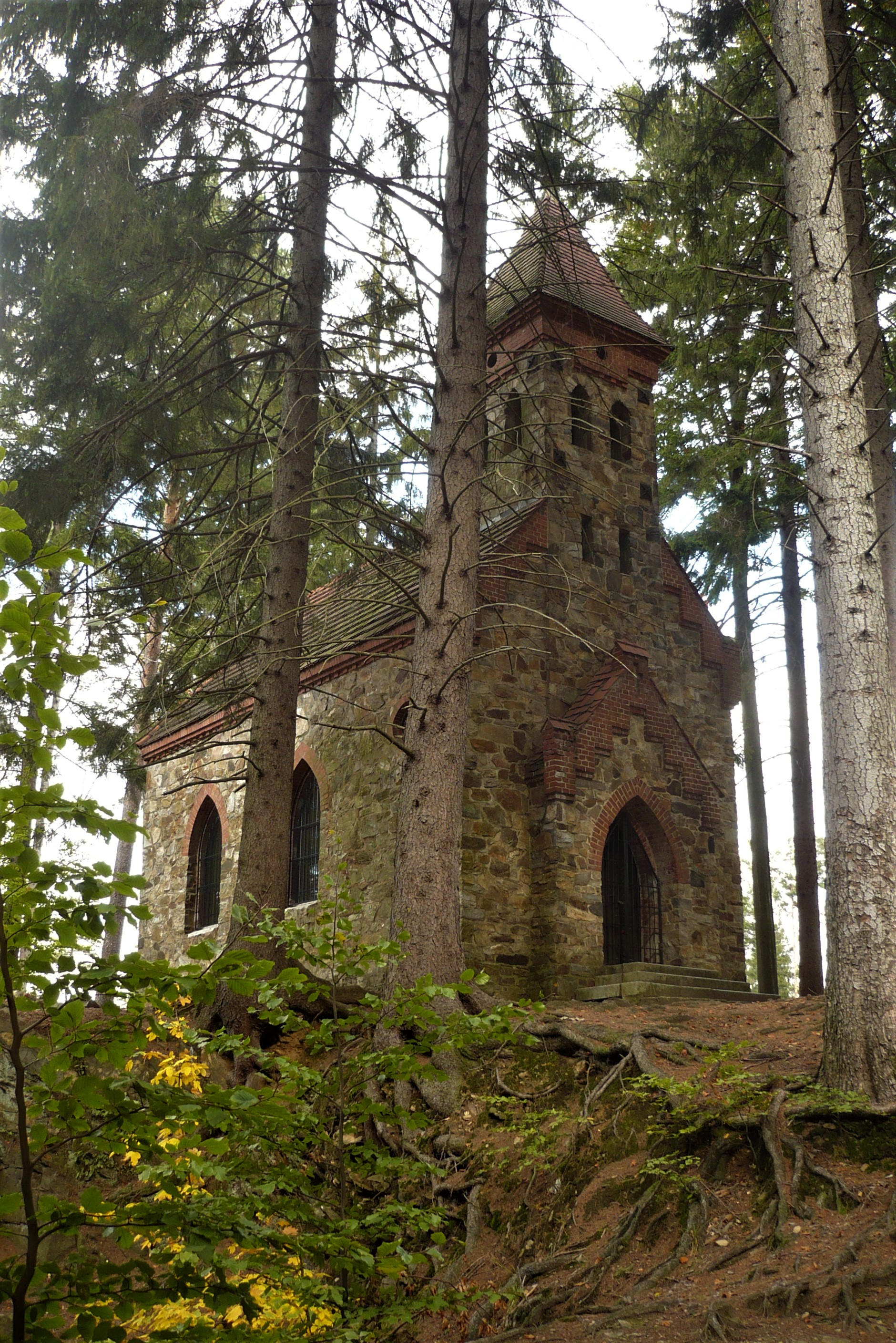 Kościół pw. św. Anny na Parkowej Gorze